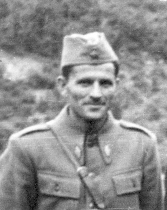 Peko Dapčević nel 1944, ritaglio da File:Peko Dapčević and Mitar Bakić with Soviets.jpg.